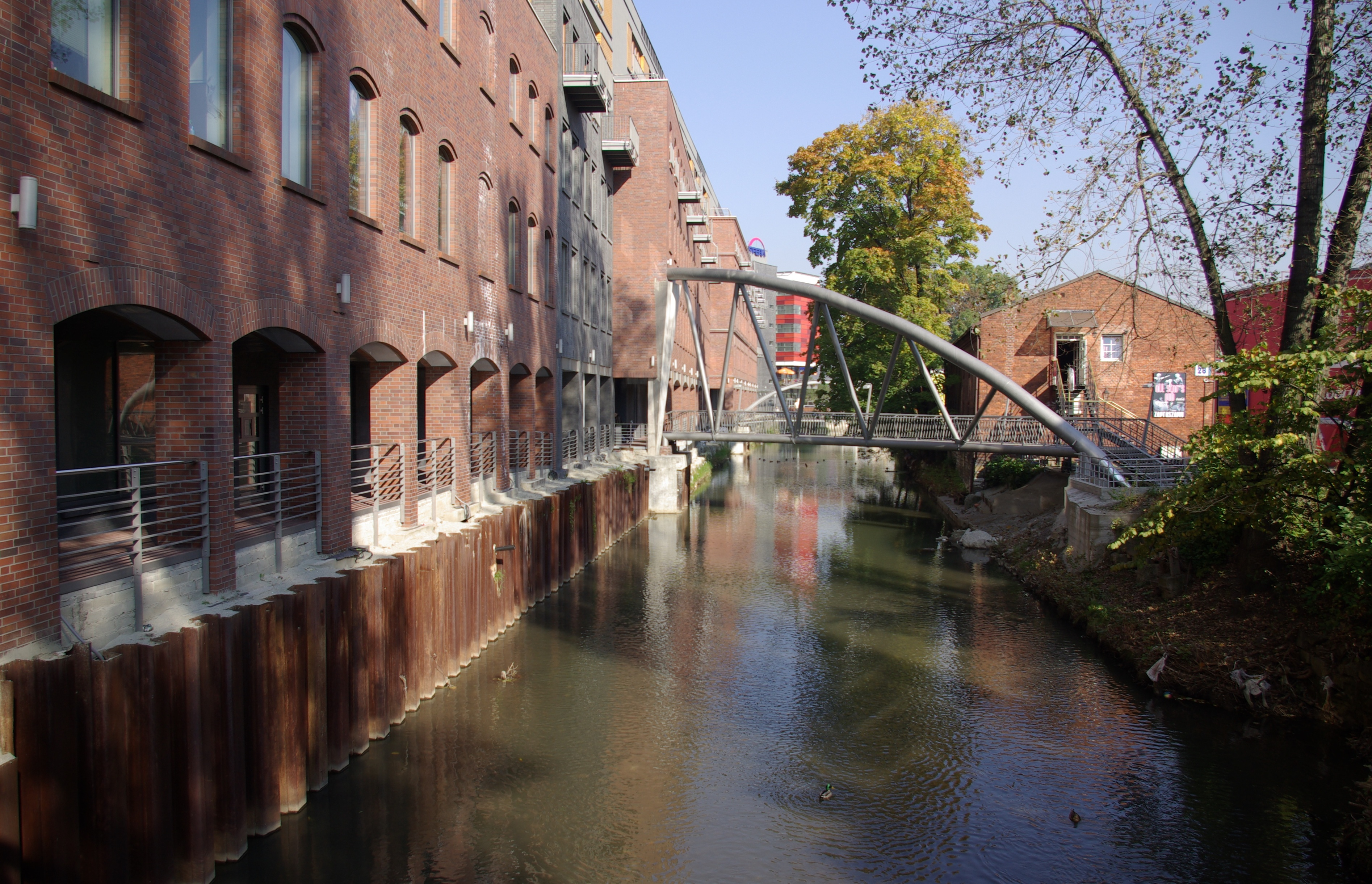 Bielsko-Biała, Biała, Galeria Sfera